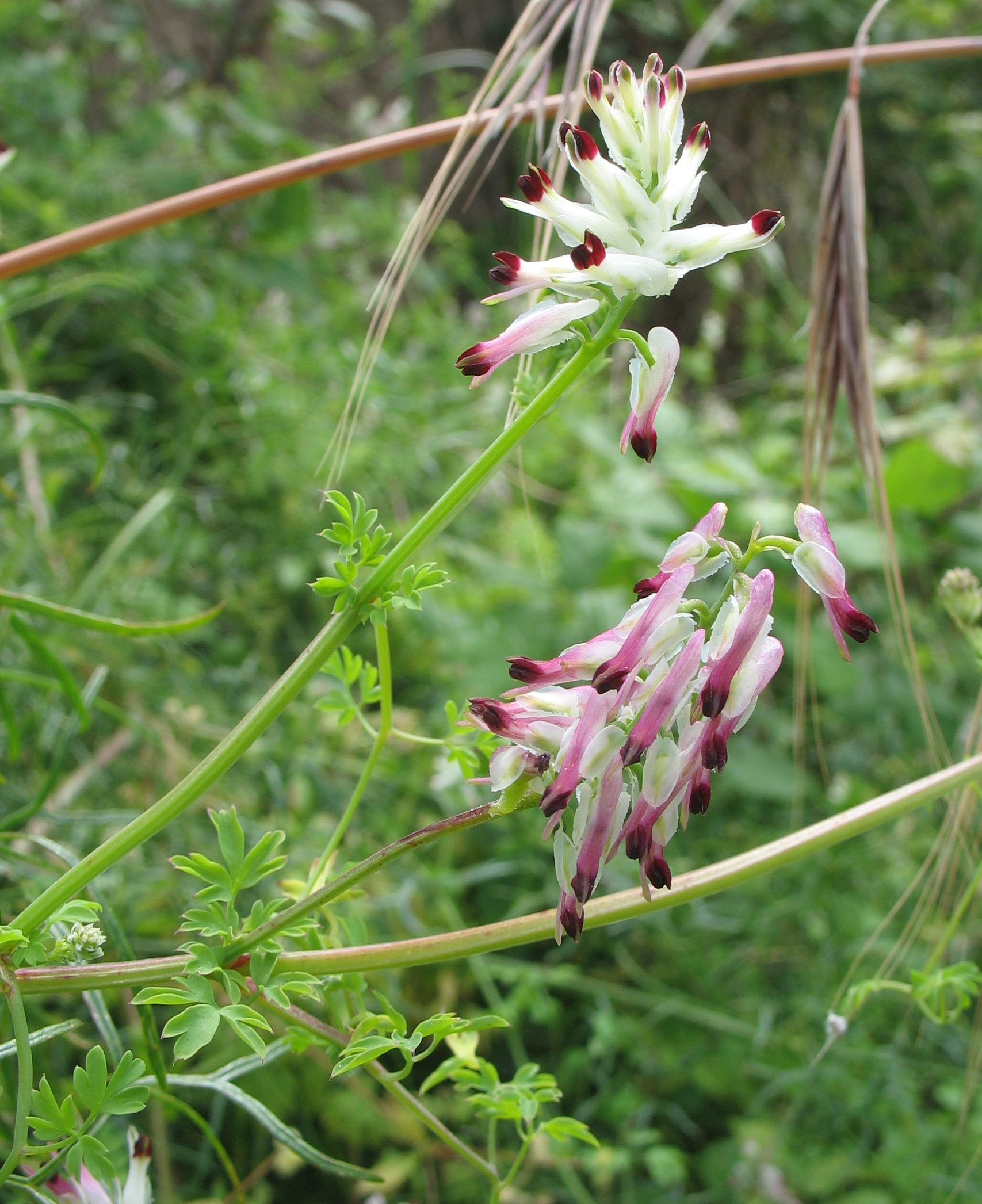 Fumaria capreolata. Moinhos da Rocha (Freguesia de Santo Estevão, Tavira, Algarve, Portugal)